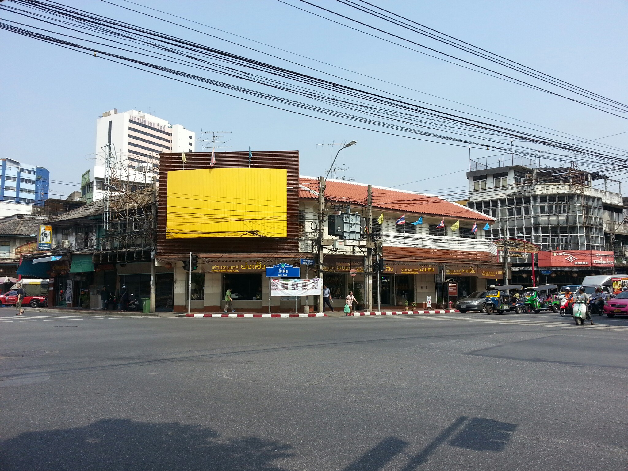 Samphanthawong, Bangkok 10100, Thailand